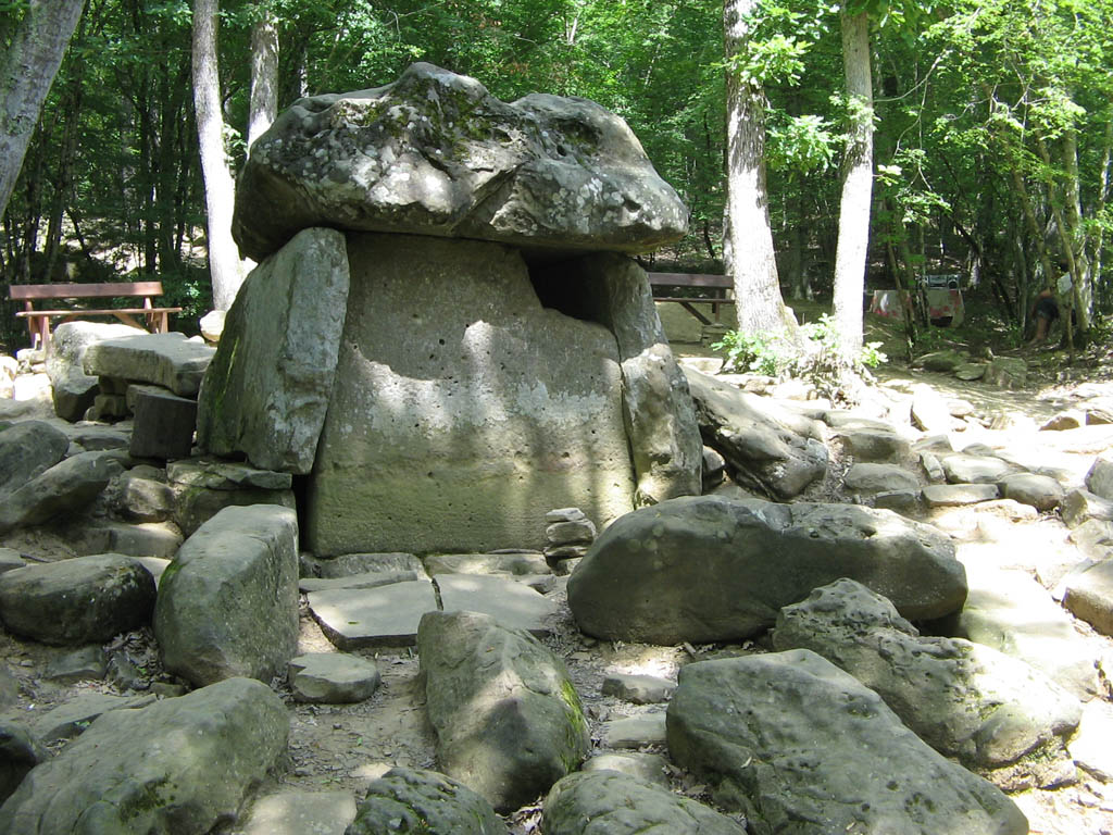 Ложнопортальный плиточный дольмен р. Жане. Темное прямоугольное отверстие в верху справа - не вход, а следствие ритуального взлома значительно позднее постройки, истинный вход расположен с тыла на тыльной плите меньшего размера, и направлен в склон горы. У этого дольмена на ложном портале нет имитации пробки.